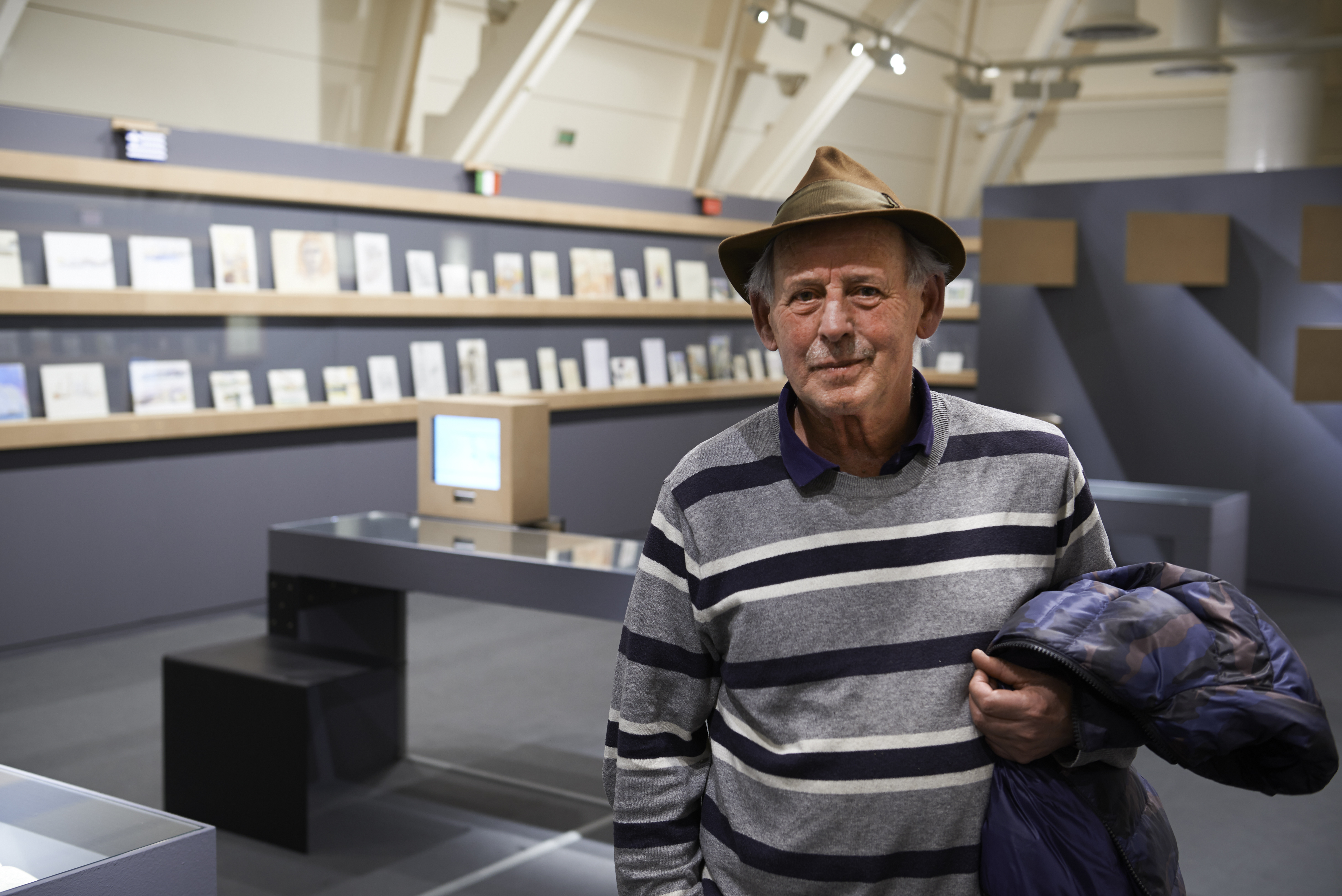 Mikel Lasa KOLDO MITXELENA Kulturuneko Ganbaran